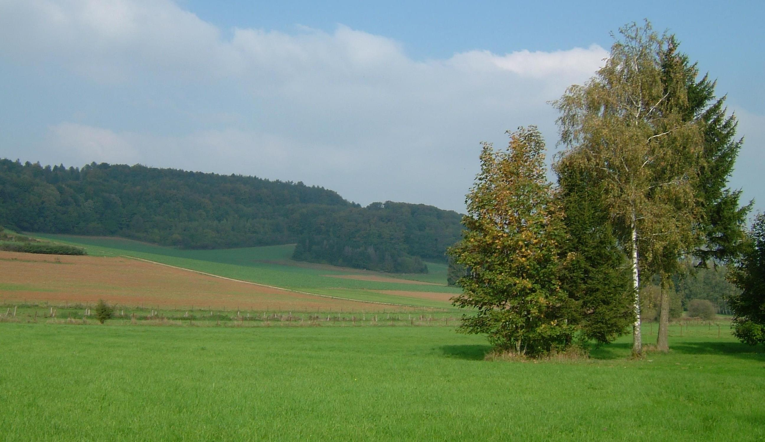 Brucherbierg bei Käl